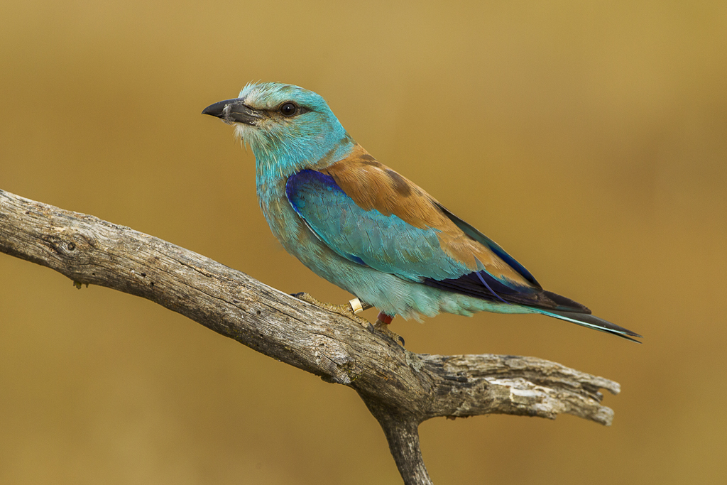 Eurasian Roller - Castuera - Estremadura_S4E5843